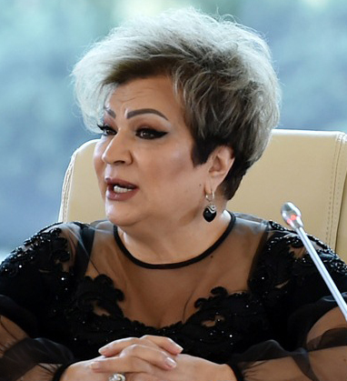 Azərbaycanın mədəniyyət və incəsənət xadimlərinin bir qrupunun Azərbaycan Respublikasının Prezidenti İlham Əliyev və birinci xanım Mehriban Əliyeva ilə görüşündə şəkilmiş foto